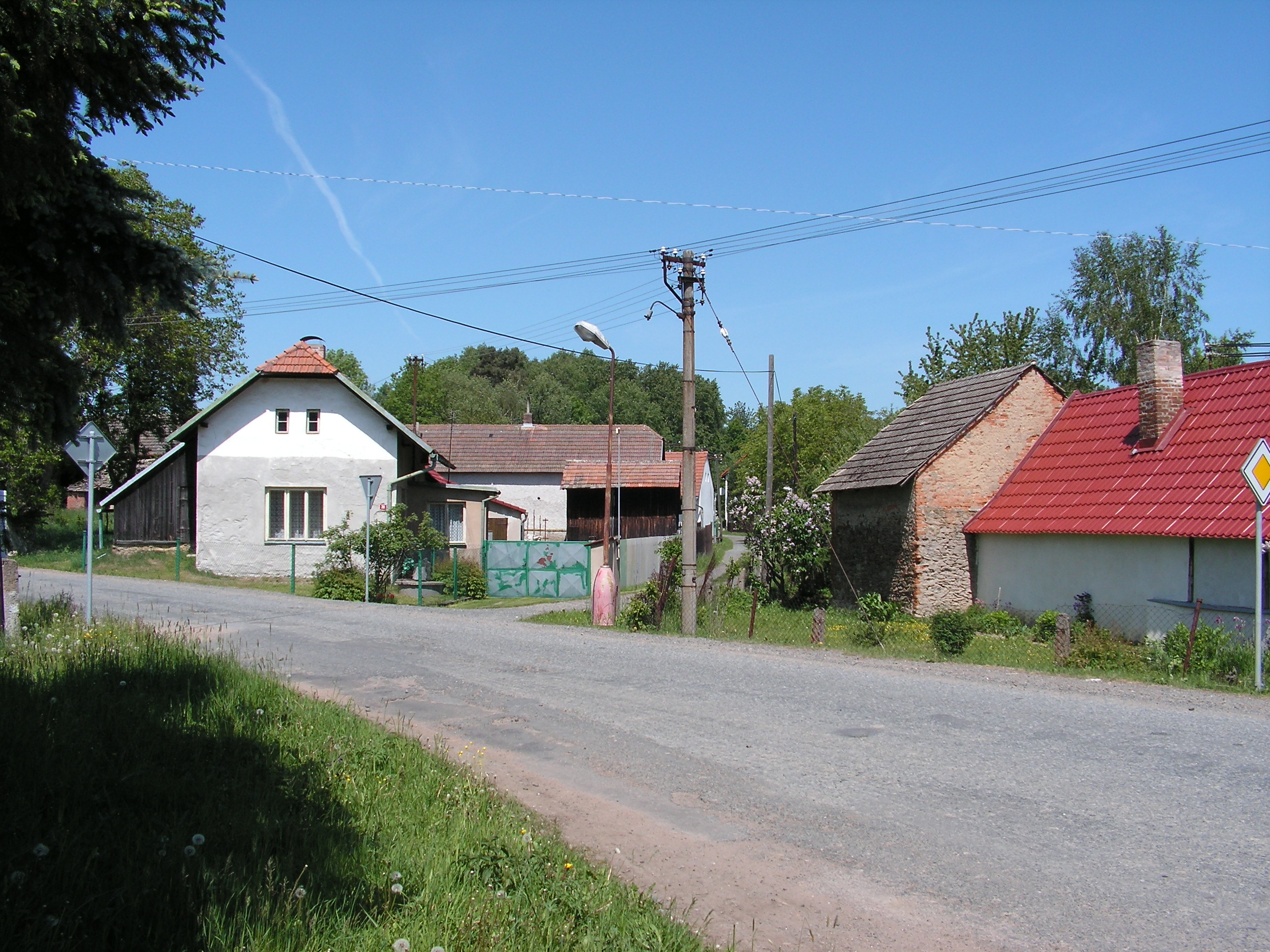 Pohled od autobusové zastávky v Krchlebské Lhotě v okrese Kutná Hora.